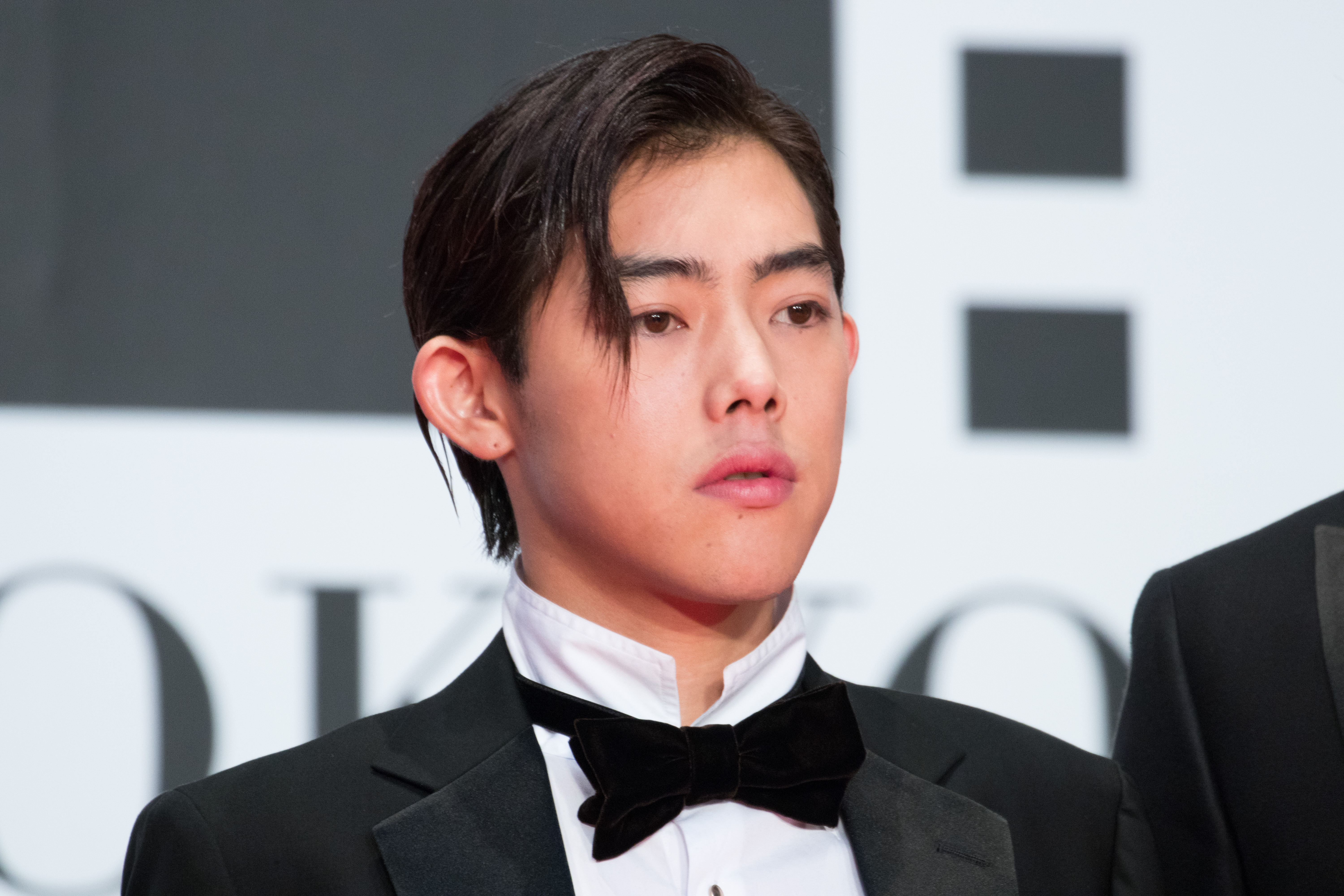 第29回 東京国際映画祭 オープニングセレモニー 吉村界人 (太陽を掴め)